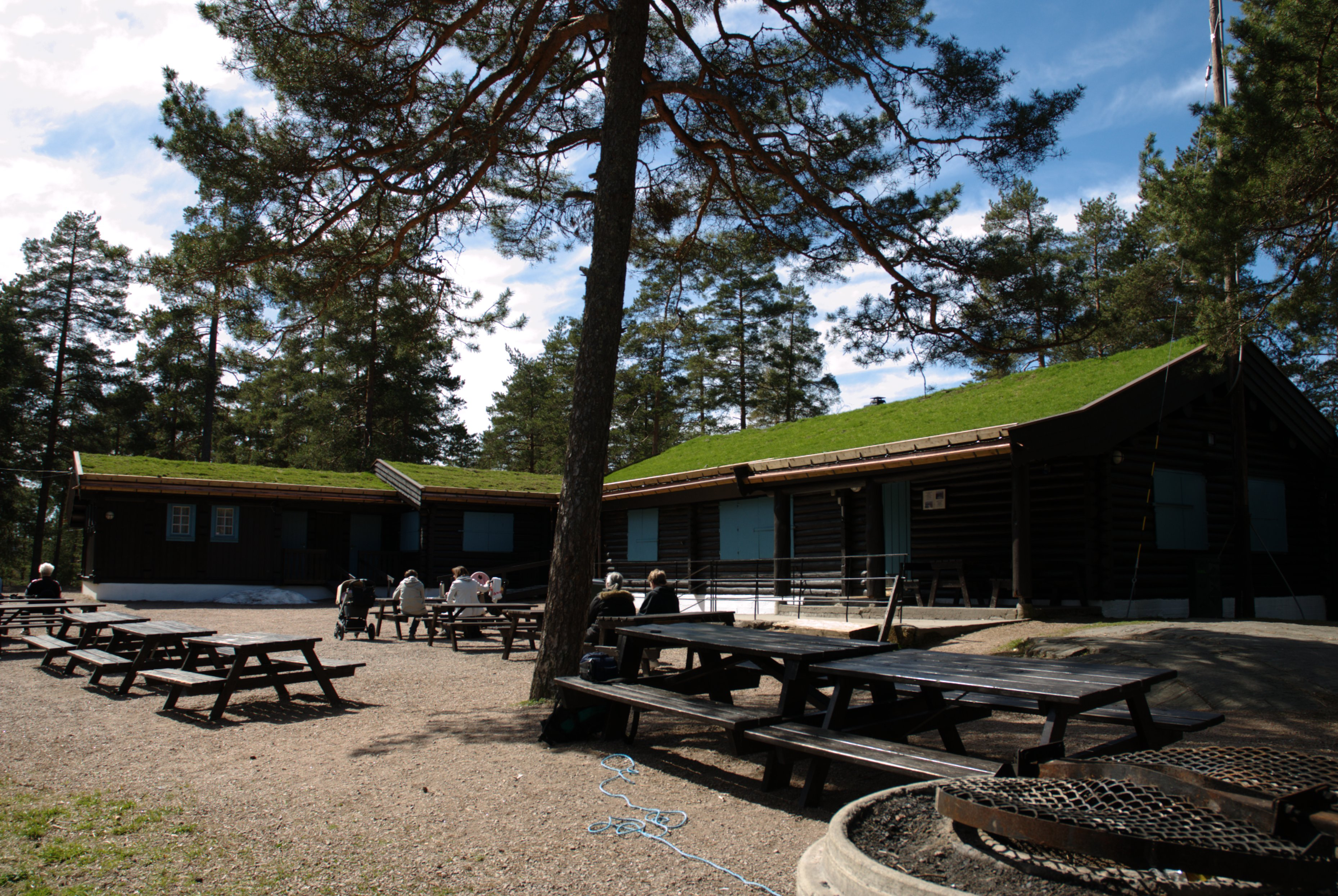 Liastua er et serveringssted og klubbhus i Gjelleråsmarka i bydel Stovner i Oslo. Stua ble bygget i 1953 og eies av Høybråten og Stovner Idrettslag.